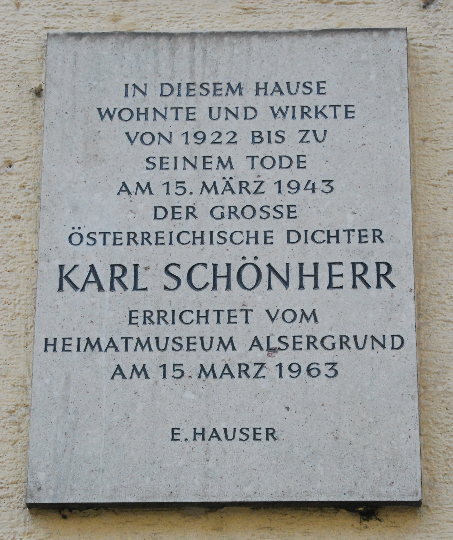 Gedenktafel für den Dichter Karl Schönherr in der Severingasse 5 in Wien-Alsergrund